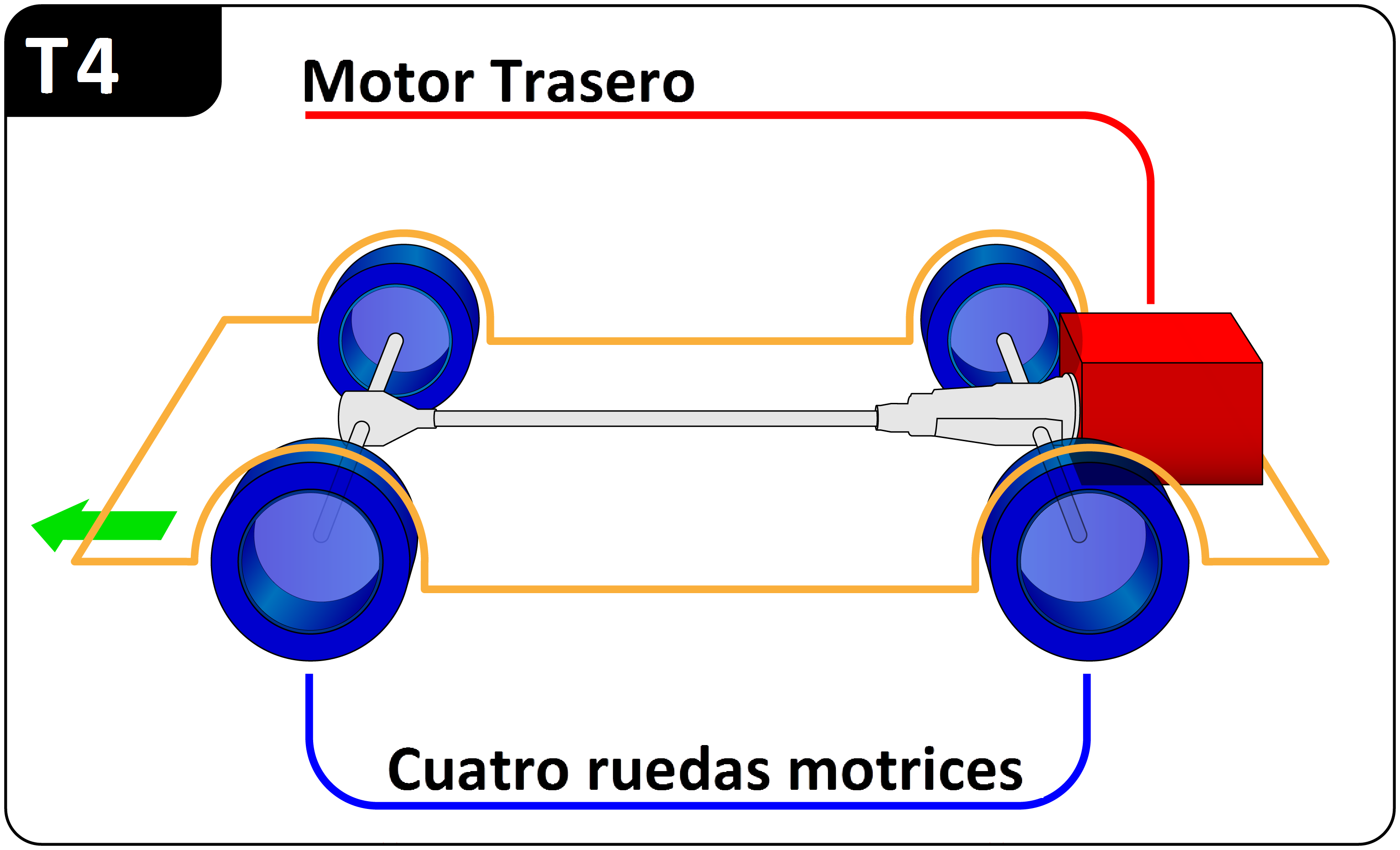 Diagrama de un vehículo con motor trasero y tracción en las cuatro ruedas (T4)